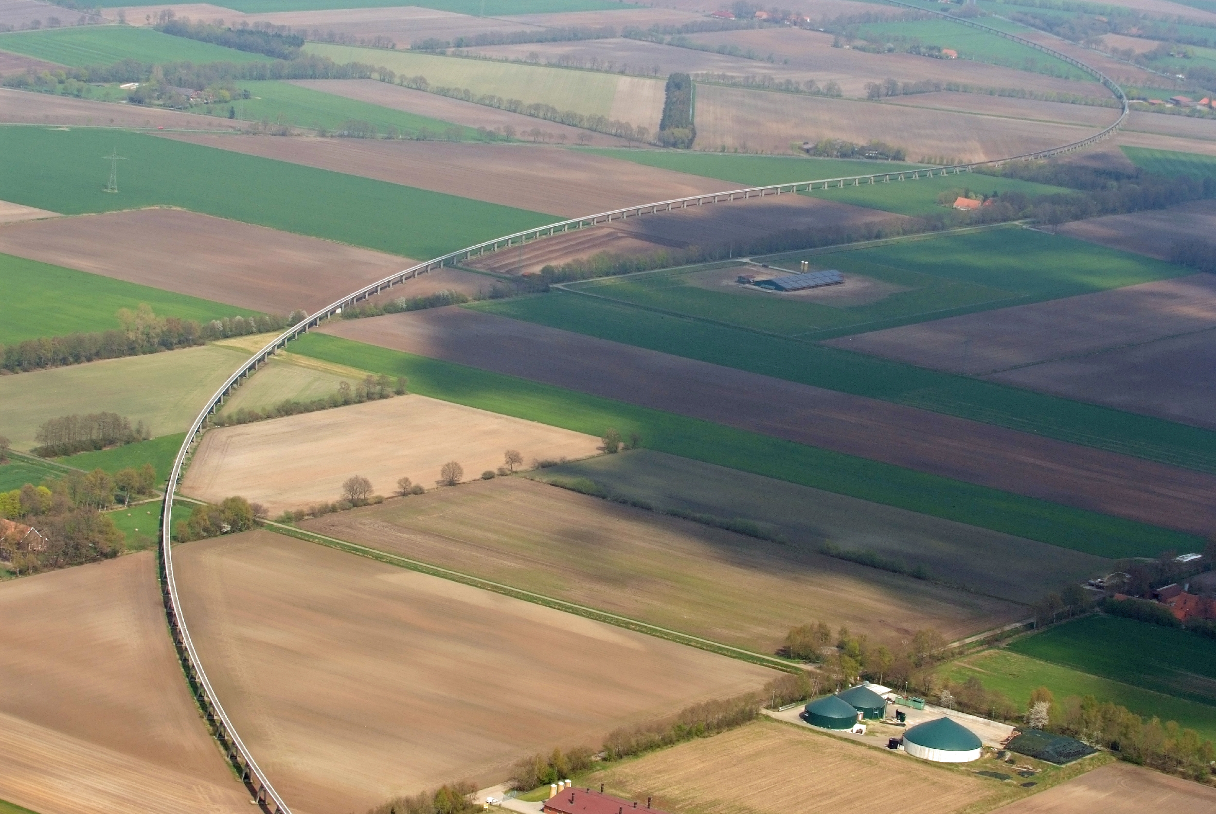 Fotoflug von Nordholz-Spieka nach Oldenburg und Papenburg